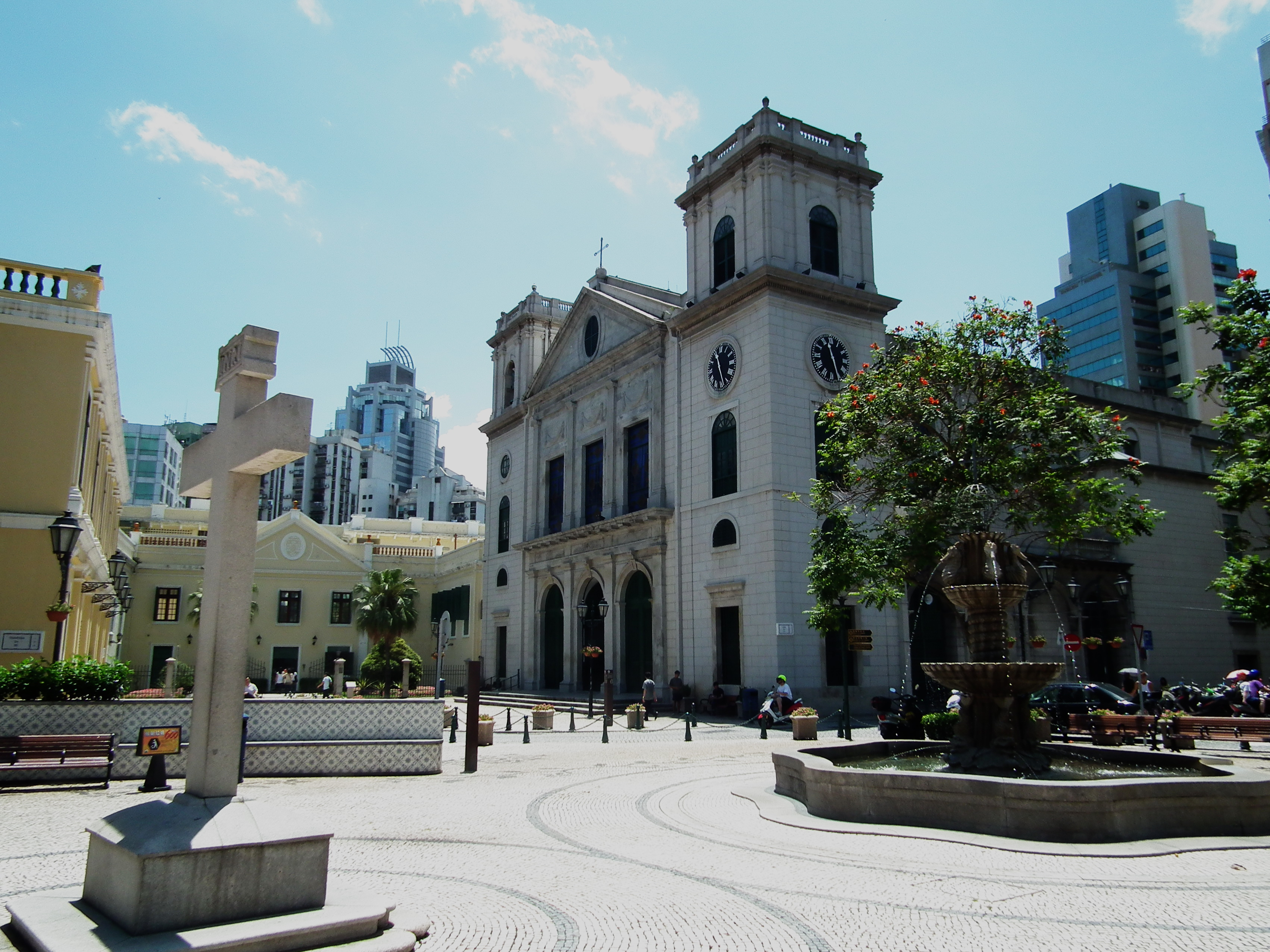 Catedral Igreja da Se 聖母聖誕主教座堂